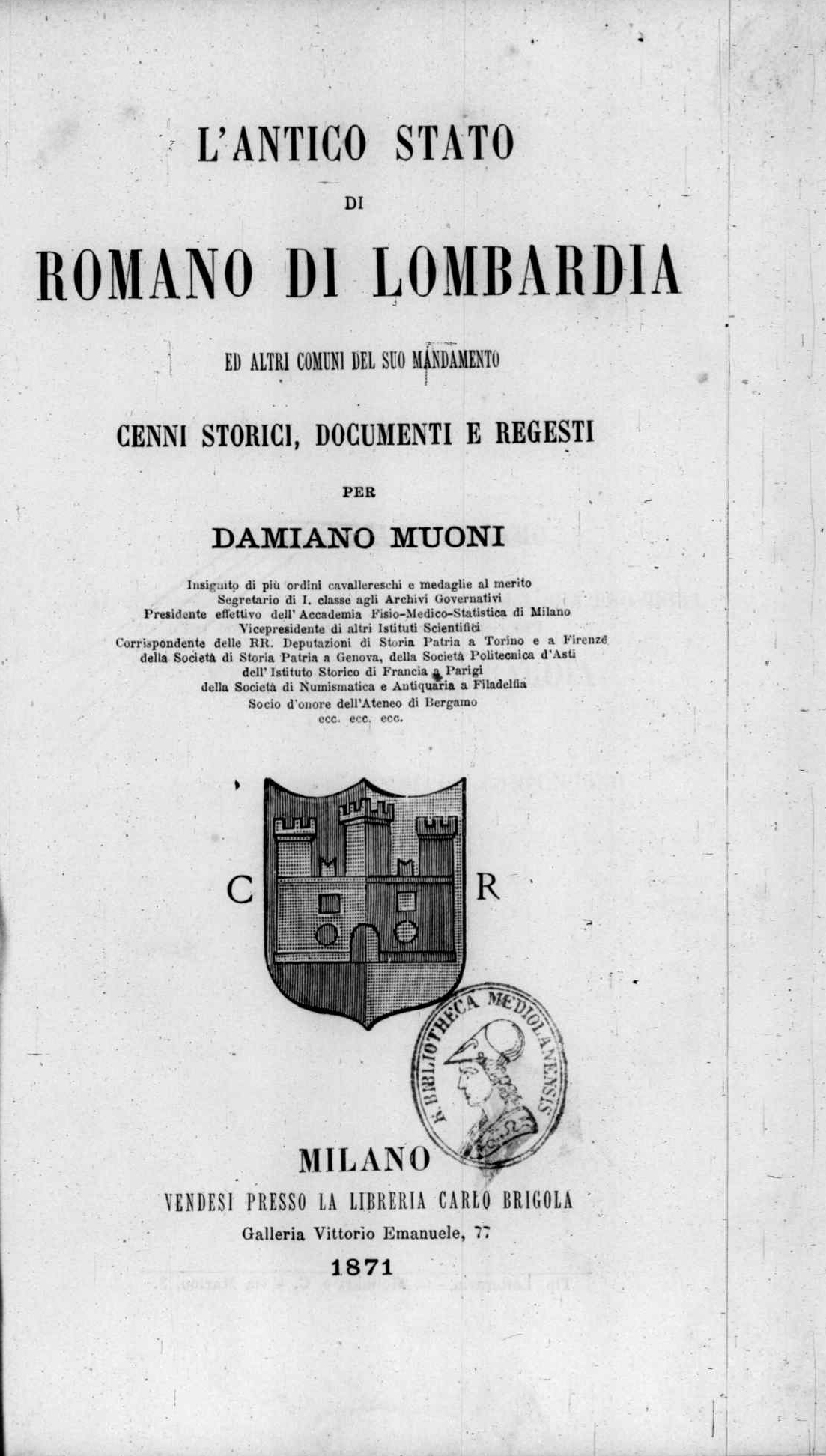 Frontespizio